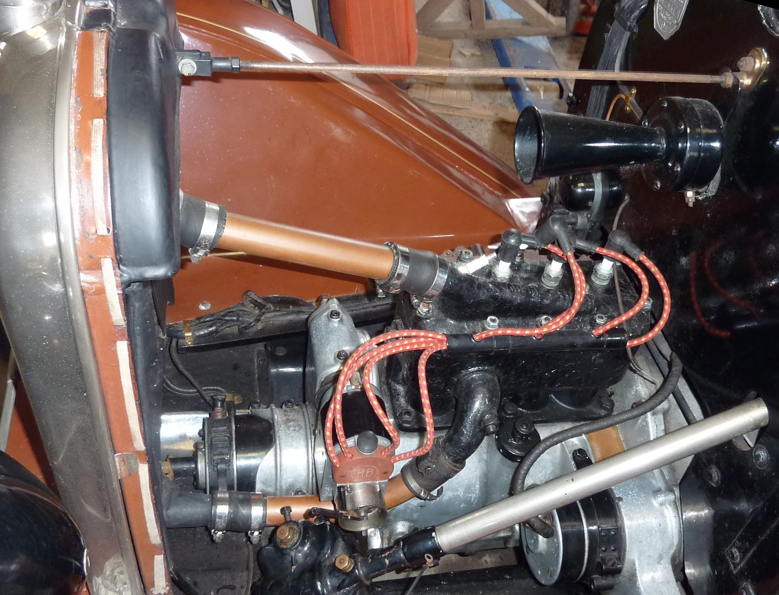 Photo d' un moteur de Citroen 5HP 1924